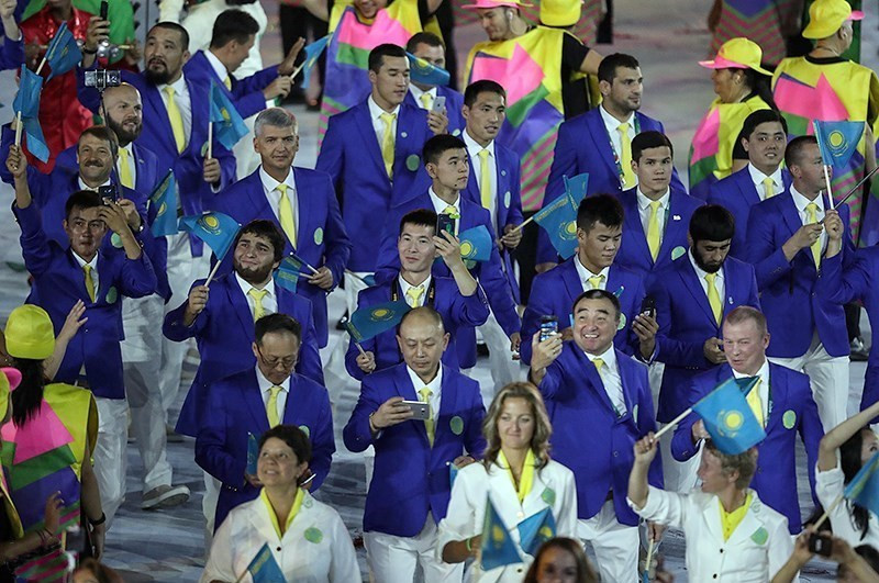 Делегация Казахстана на открытии Летних олимпийских игр в Рио-де-Жанейро